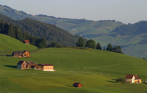 Appenzellerland bei Brülisau: Einzelhöfe